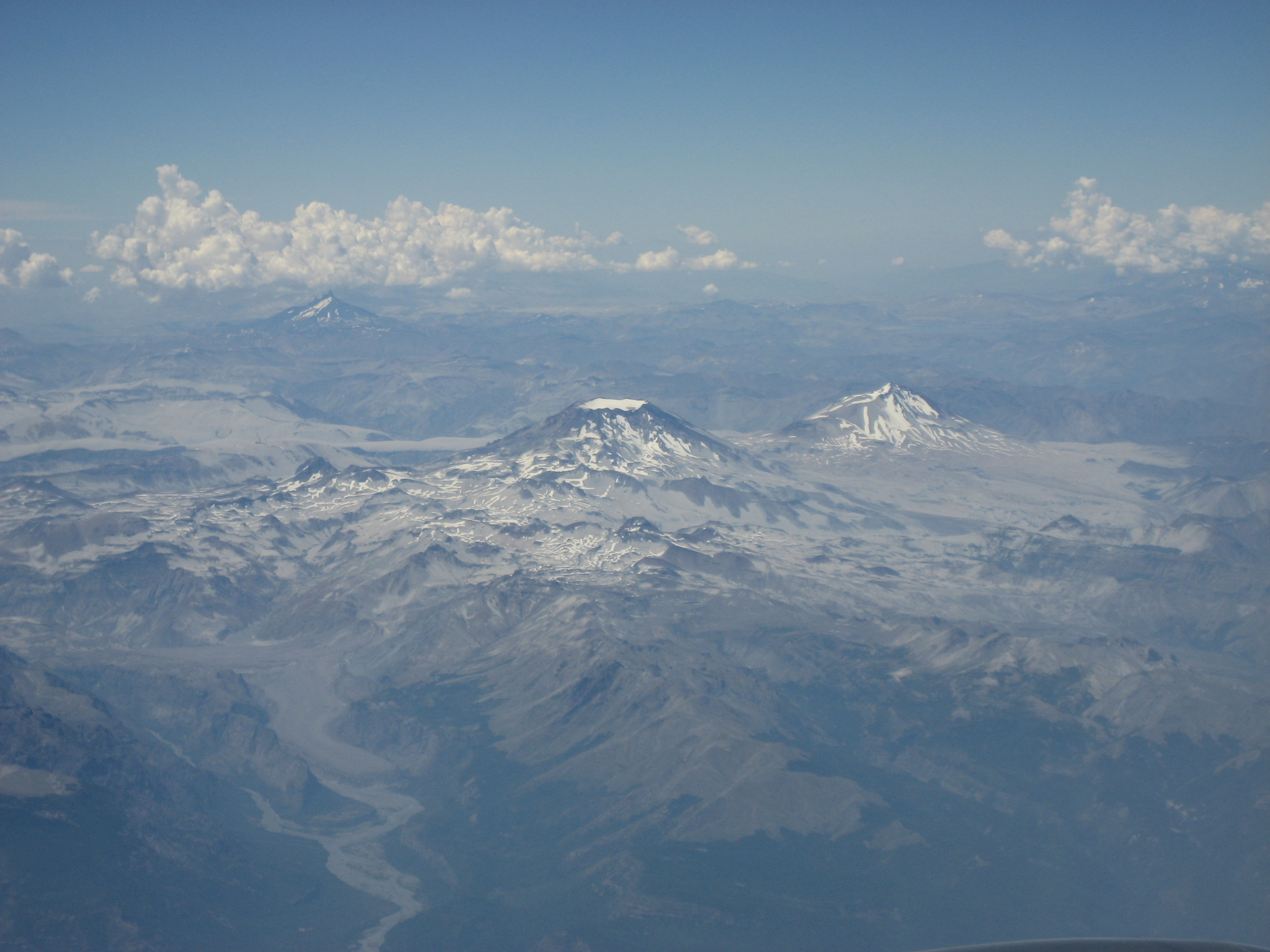 Descabezado Grande and Cerro Azul volcanoes, Chile.